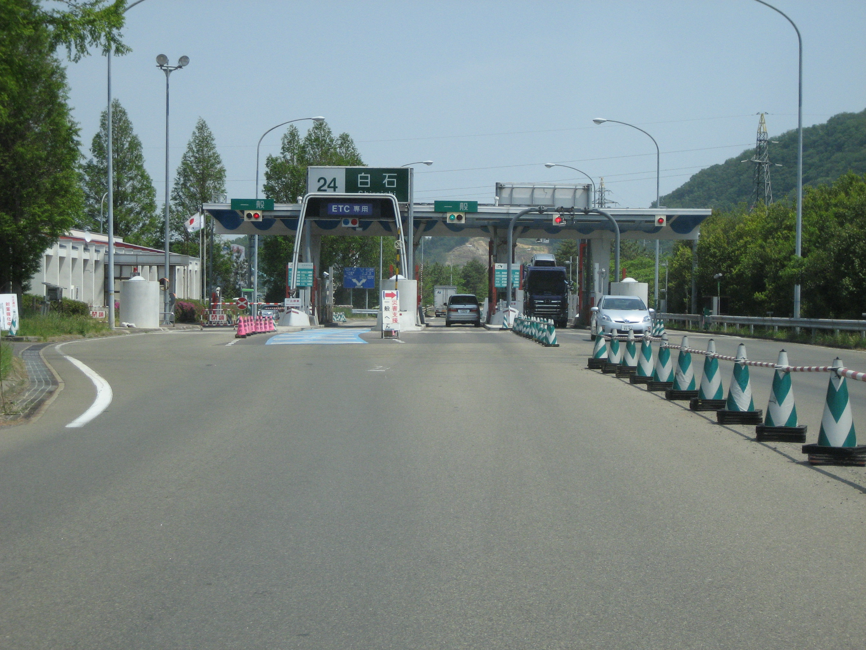 東北自動車道白石IC料金所